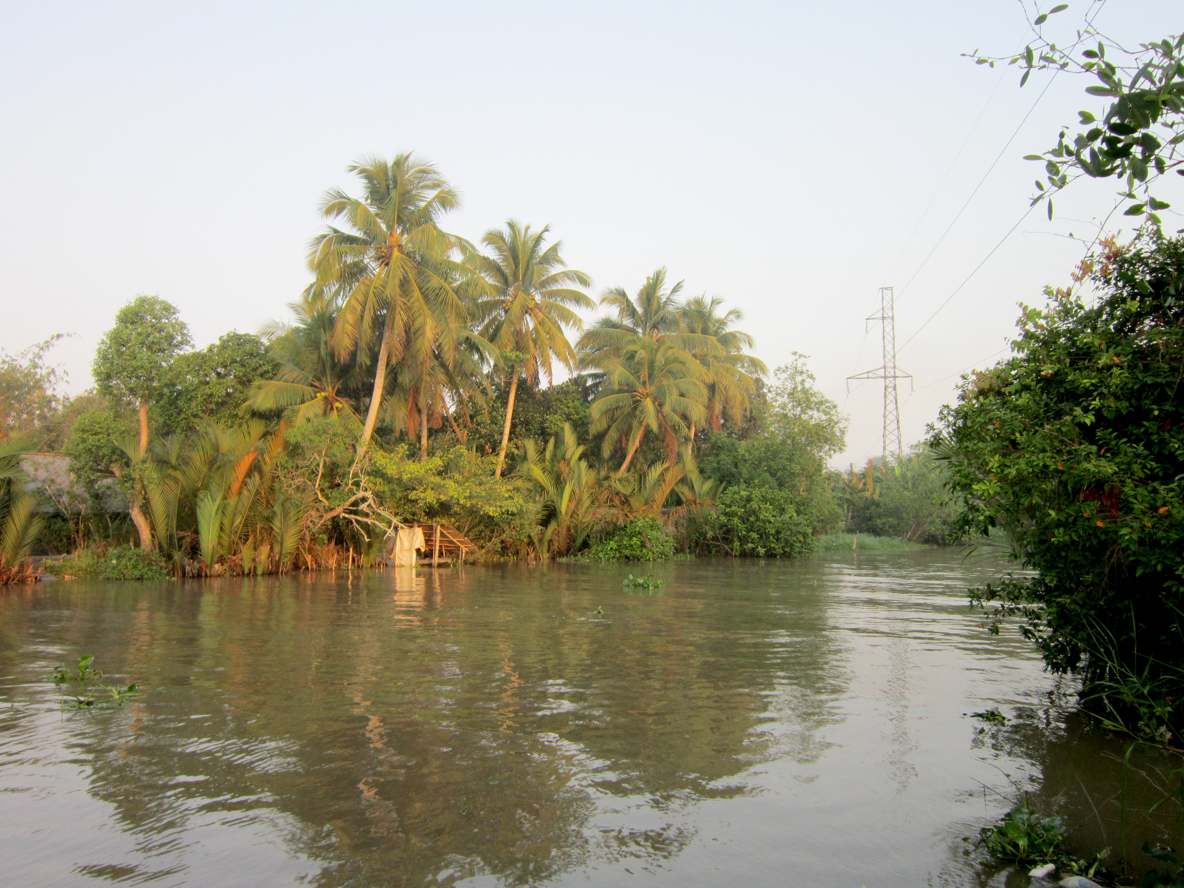 Rạch Trà Niềng ở Phong Điền, thành phố Cần Thơ, Việt Nam.